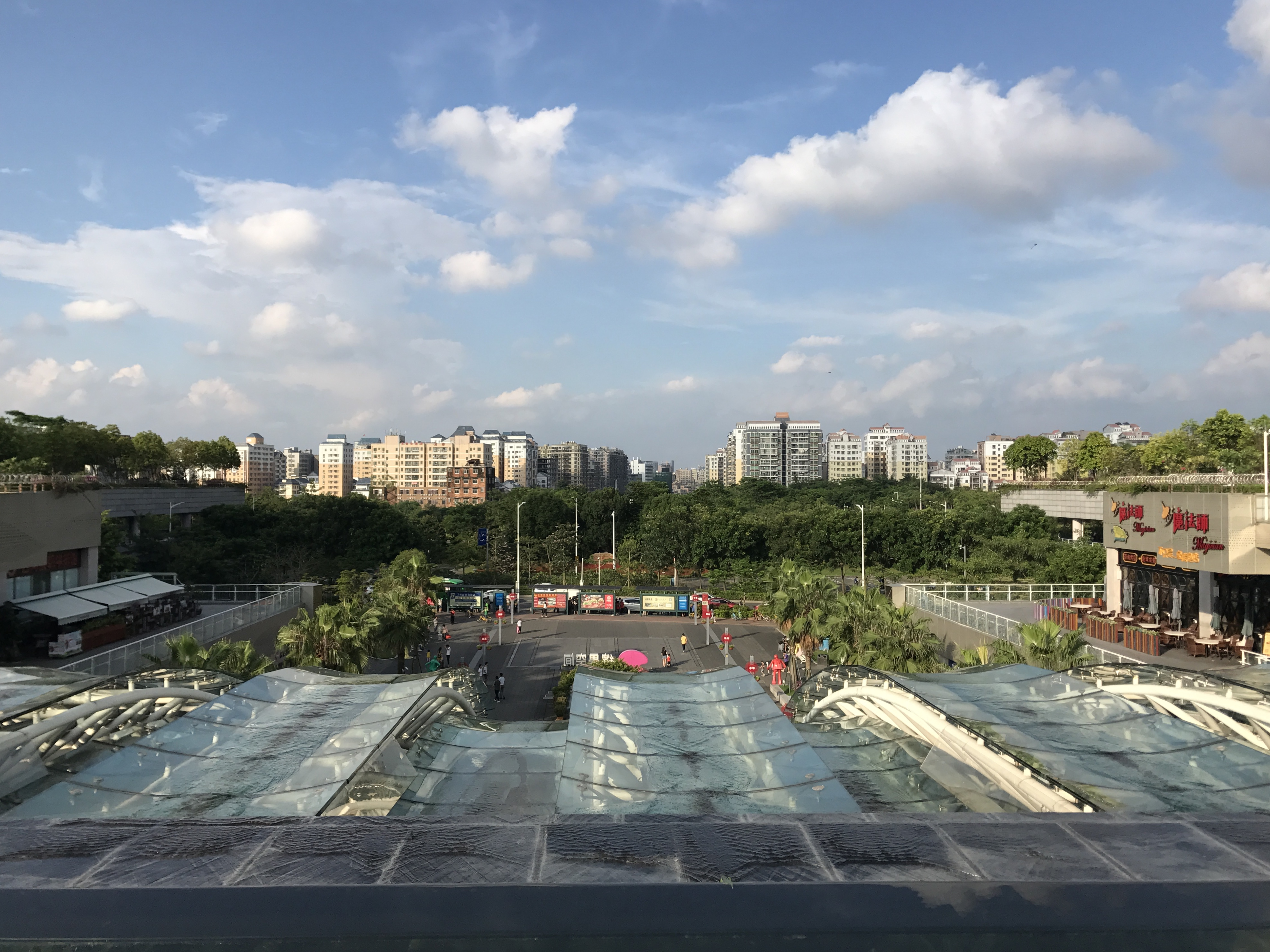 深圳北駅西口前の広場